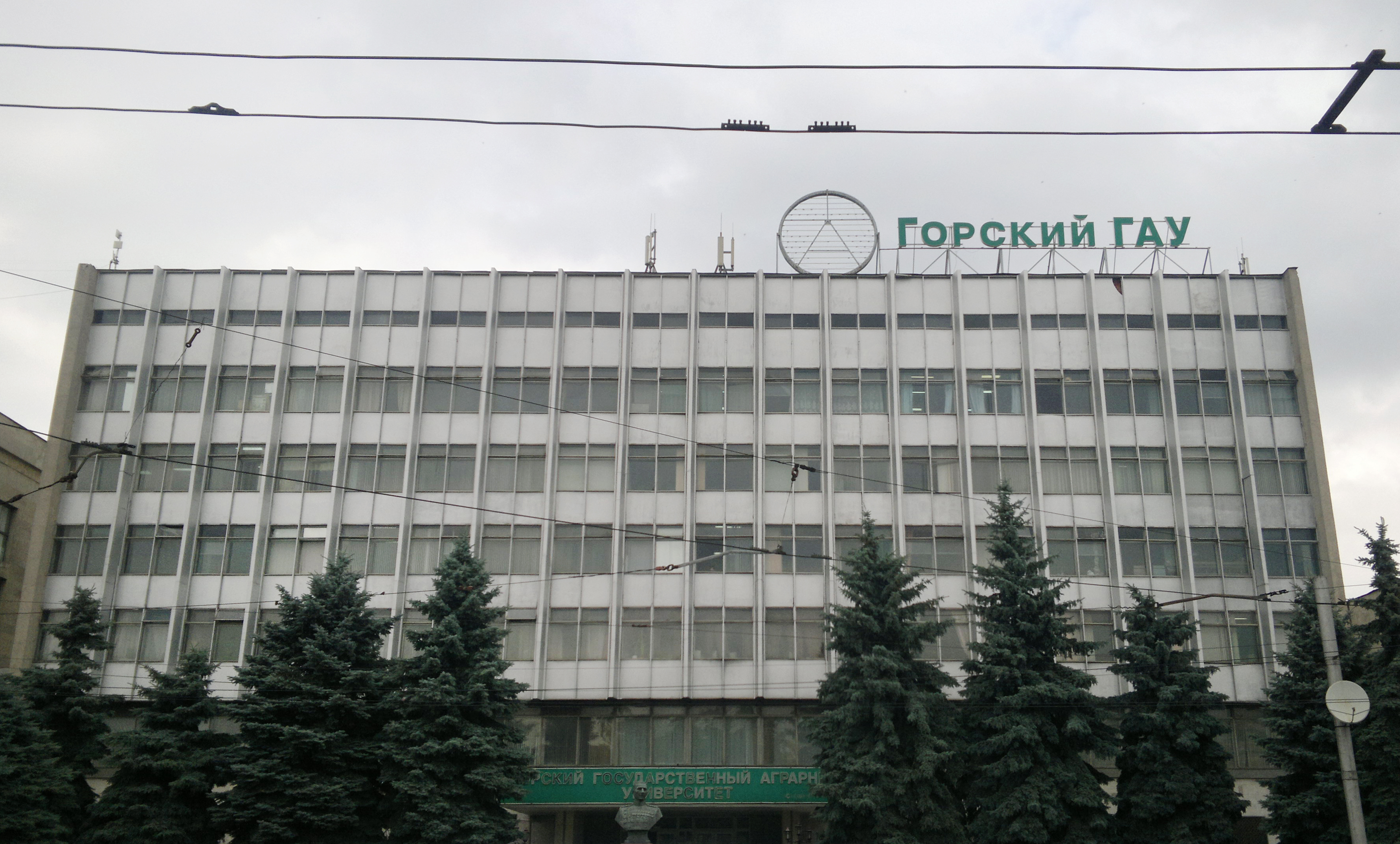 Аграрный университет (Владикавказ)